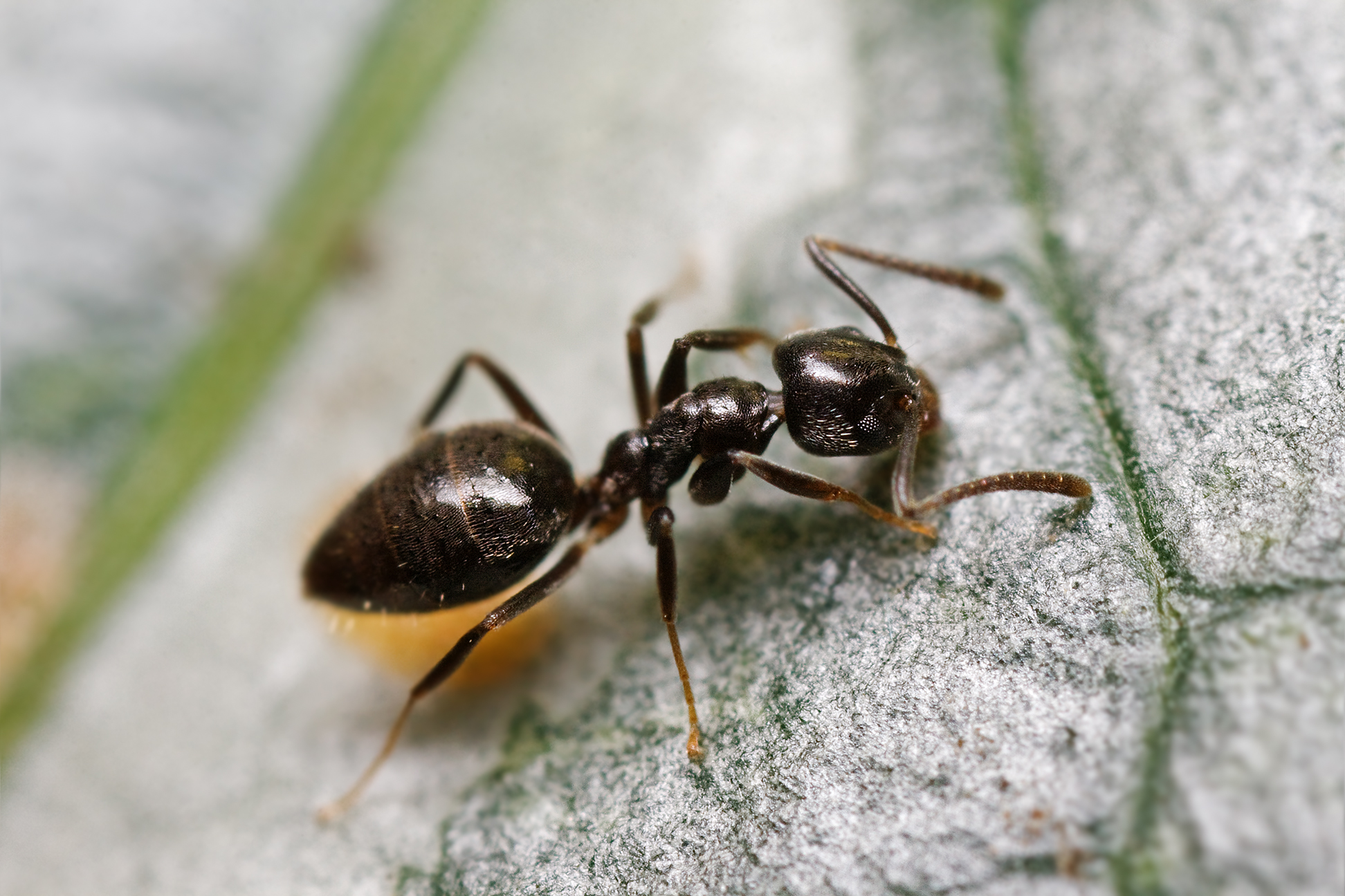 1.2 only